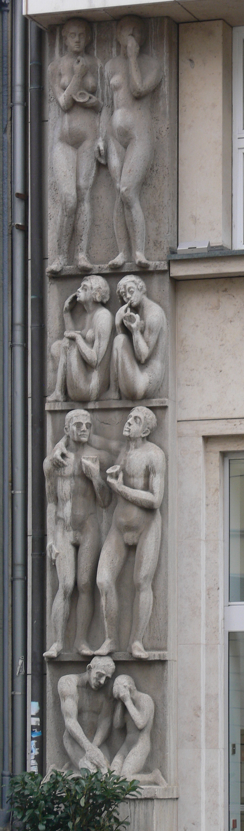 Sparkasse, Anger 25, Erfurt Relief von Hans Walther: leichtsinnige Geldverschwendung und ihre Folgen